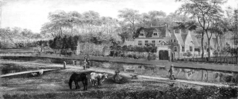 View on Oversteen